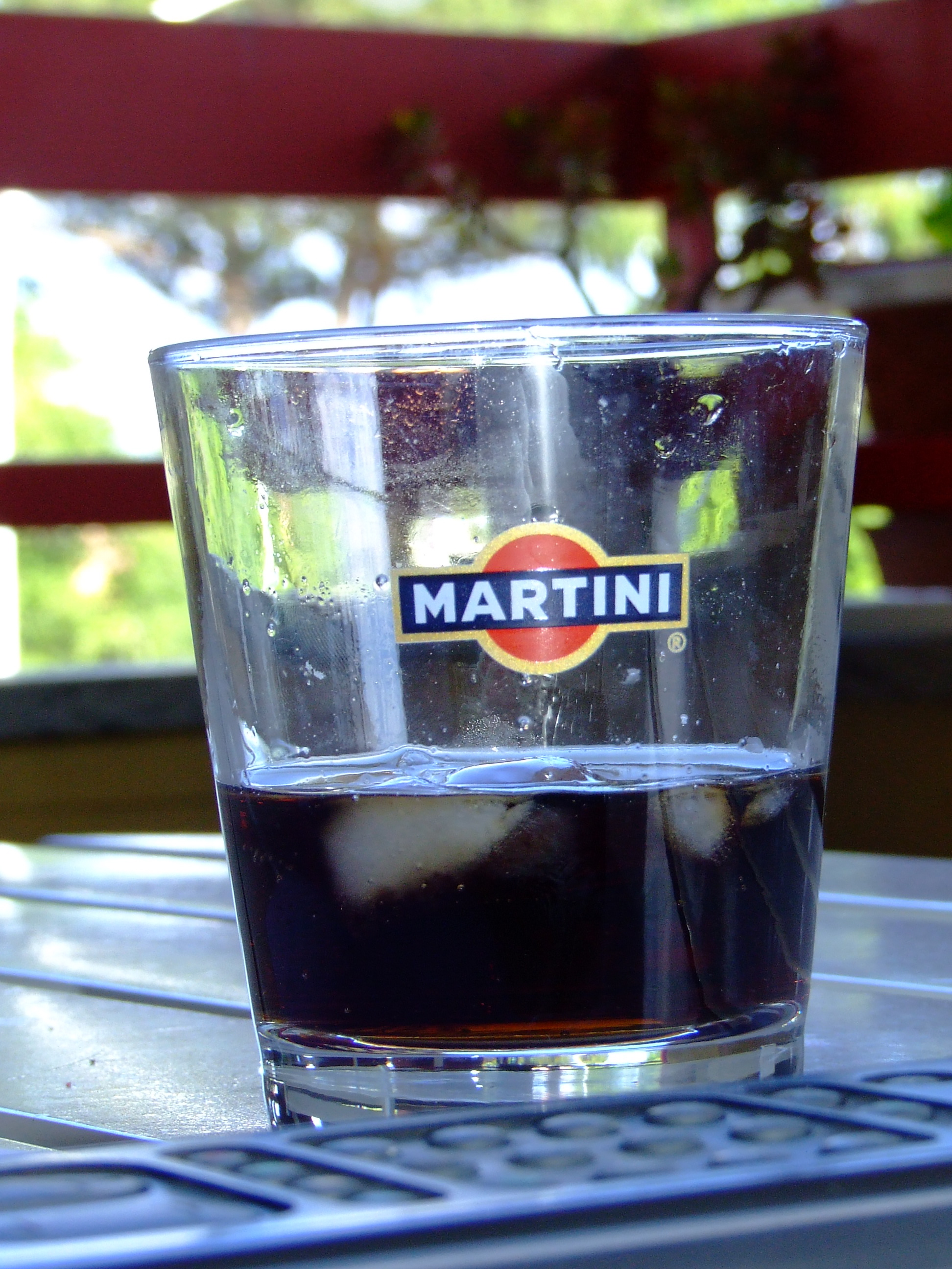 Cocktail Martini glass